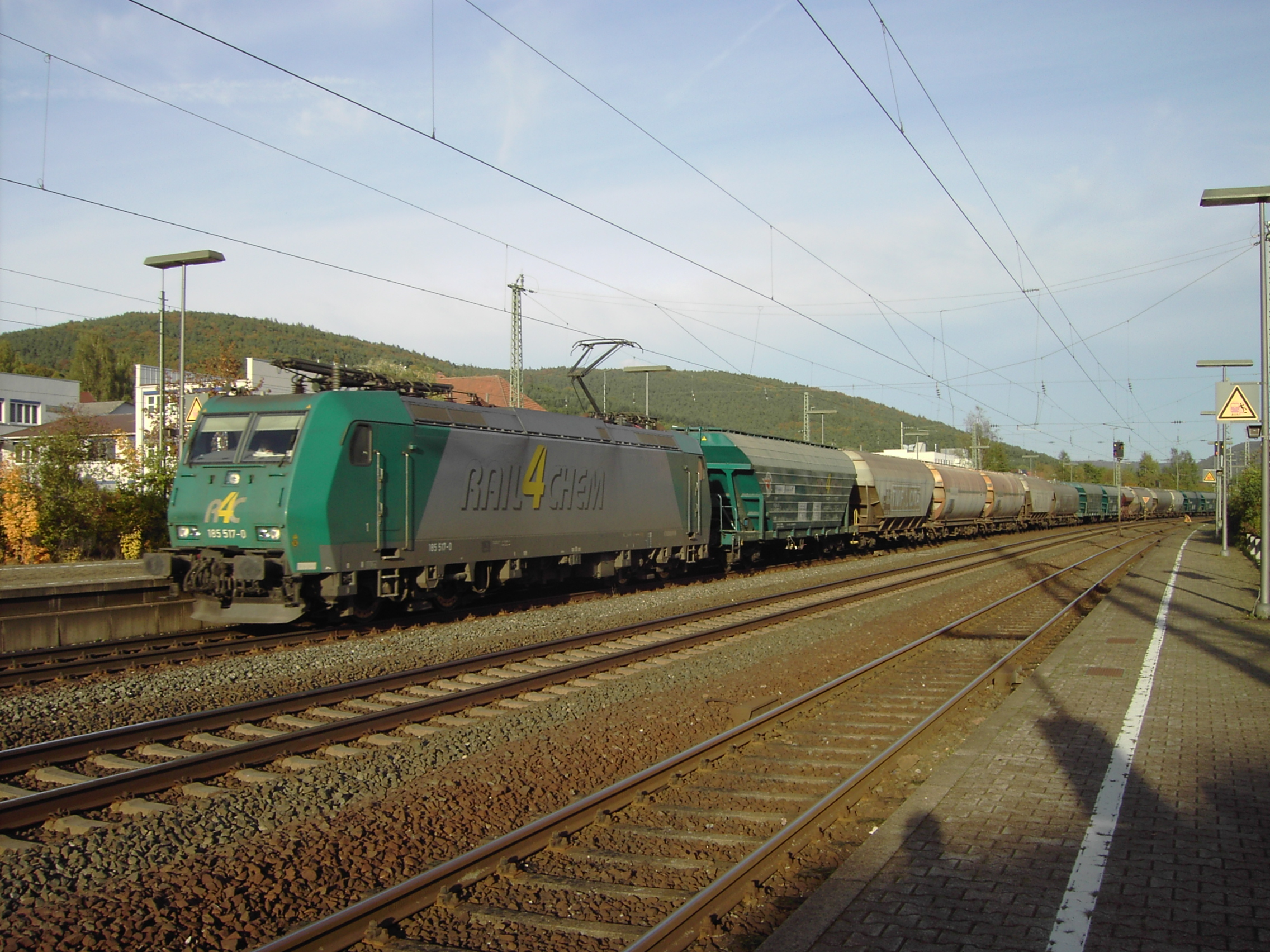 Eine Lokomotive der Baureihe 185 von Rail4chem durchfährt mit ihrem Güterzug den Bahnhof Lohr (Main).